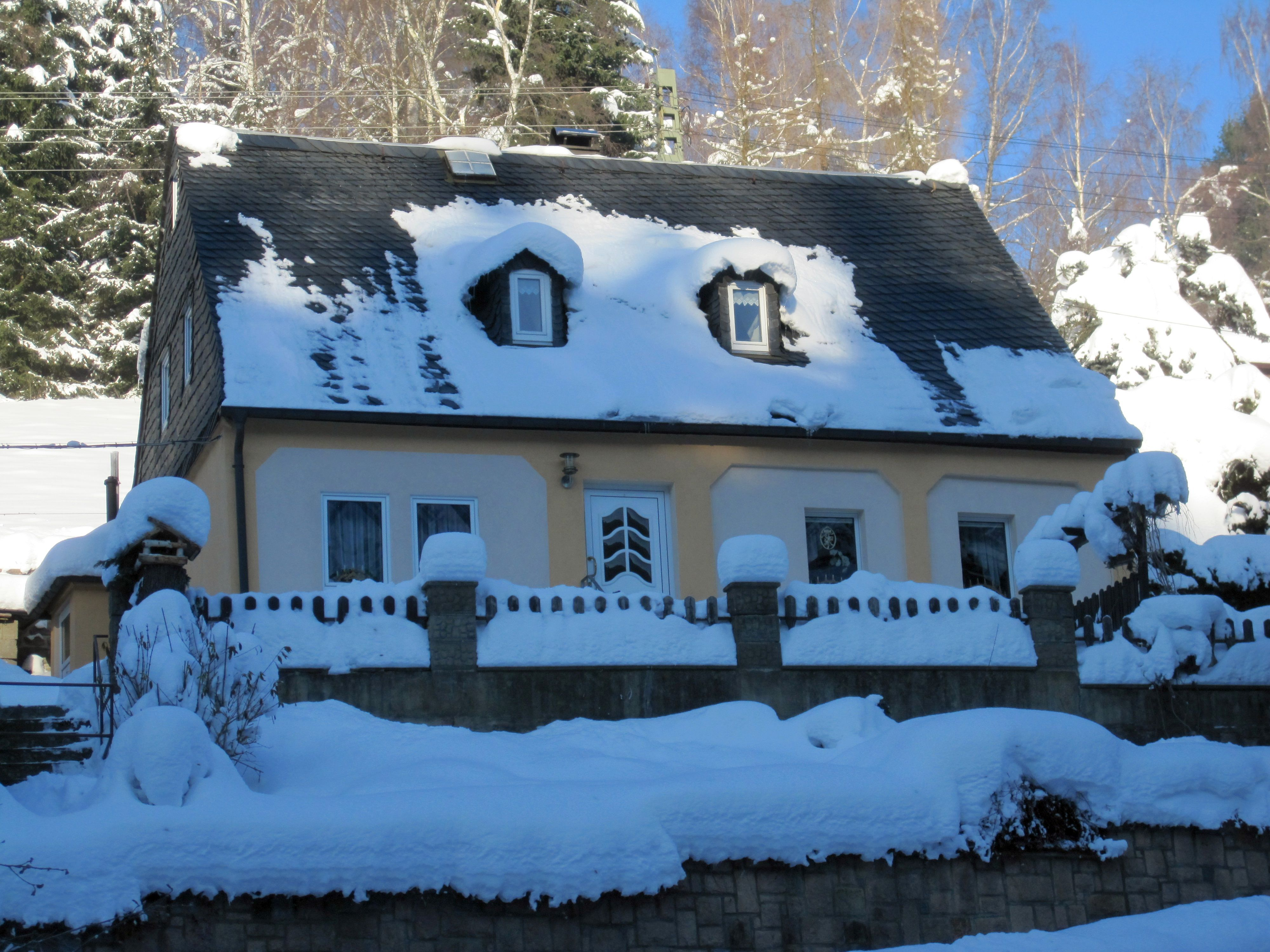 „Wohnhaus (Umgebinde) eines Häusleranwesens; Umgebindehaus von bauhistorischer Bedeutung als seltenes Zeugnis ländlicher Bauformen im Ort. Datierung: Mitte 18. Jahrhundert (Häusleranwesen)" - (aus: Kulturdenkmale im Freistaat Sachsen, Landesamt für Denkmalpflege)